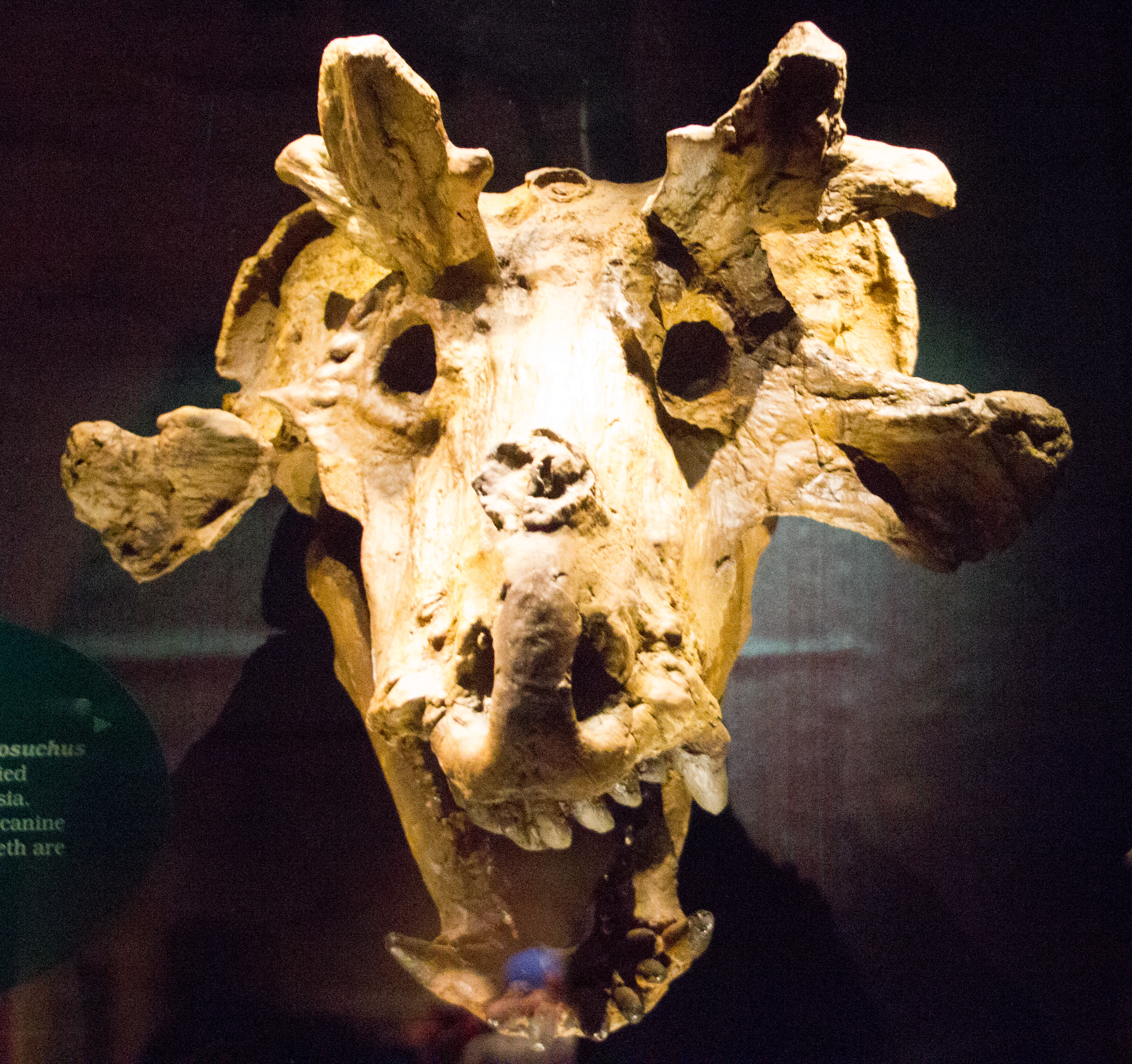 2ti-drumheller-last-day-20120804-45.jpg